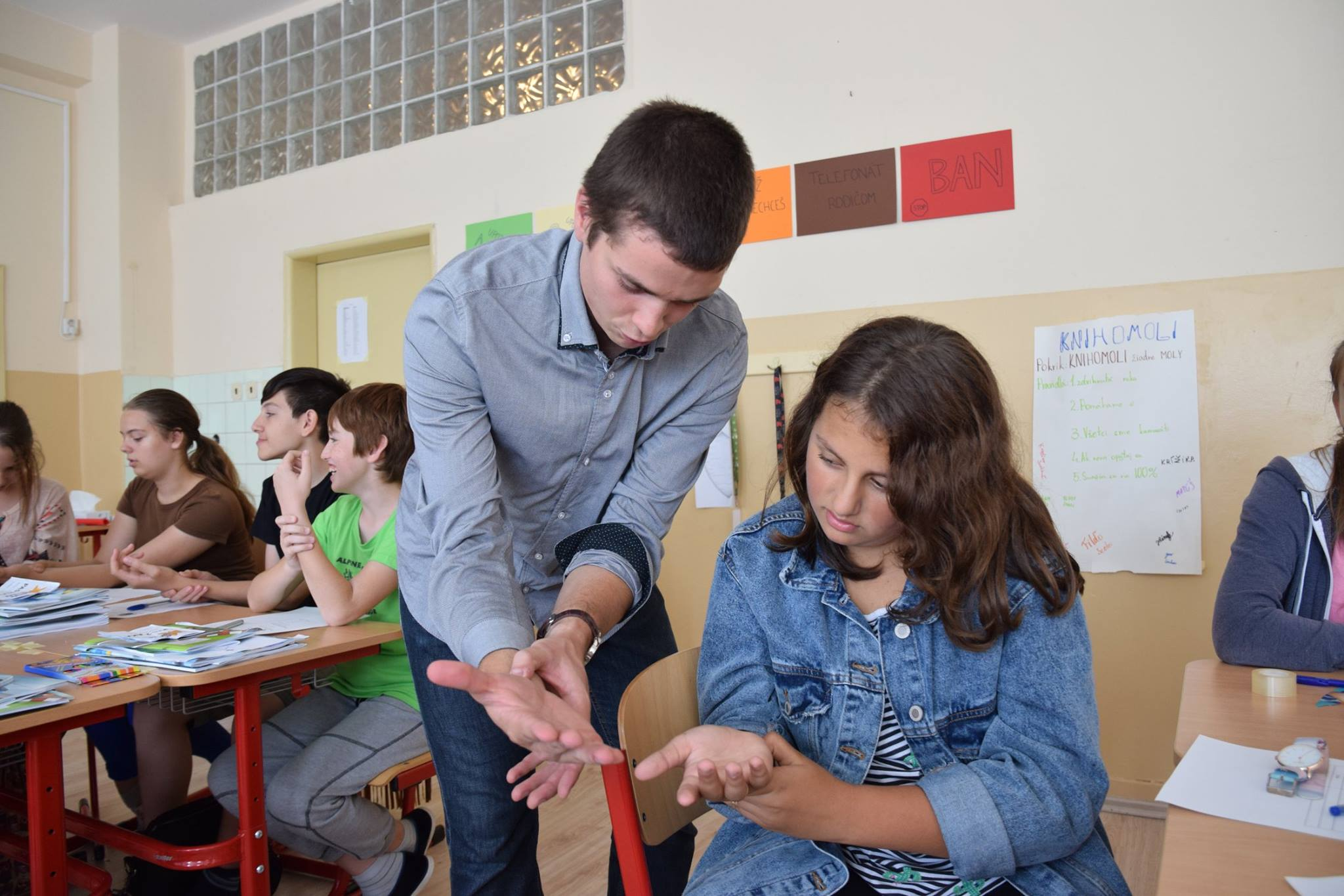 Matúš študoval inžinierske konštrukcie a dopravné stavby na STU Bratislava. Do programu sa rozhodol pridať, aby mohol zlepšiť vzdelávacie podmienky pre novú generáciu. Na Basecampe a Letnej škole si trénoval svoje učiteľské a líderské zručnosti.